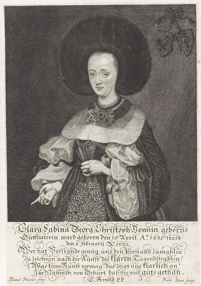 Grafik aus dem Klebeband Nr. 3 der Fürstlich Waldeckschen Hofbibliothek Arolsen Motiv: Clara Sabina Hönn, geb. Gutthäter (1635–1665), Tochter des Kaufmanns Erasmus Gutthäter, zweite Ehefrau des Georg Christoph Hönn (siehe auch File:Georg Christoph Hönn.jpg) GND: 131980416 "Clara Sabina Georg Christoph Hönnin, geborene Gutthäterin, ward geboren den 10. April A°1635 starb den 6. Februar A°1665. Wer hat Verstands genug, uns den Verstand zumahlen; zu zeichnen nach der Kunst die klaren Tugendstrahlen? Was keine Kunst vermag, das zeigt uns klarlich an Ihr Dahmen von Geburt daß Sie viel guts gethan. C. Arnold, P.P. Daniel Preisler pinx. Philip Kilian sculp."